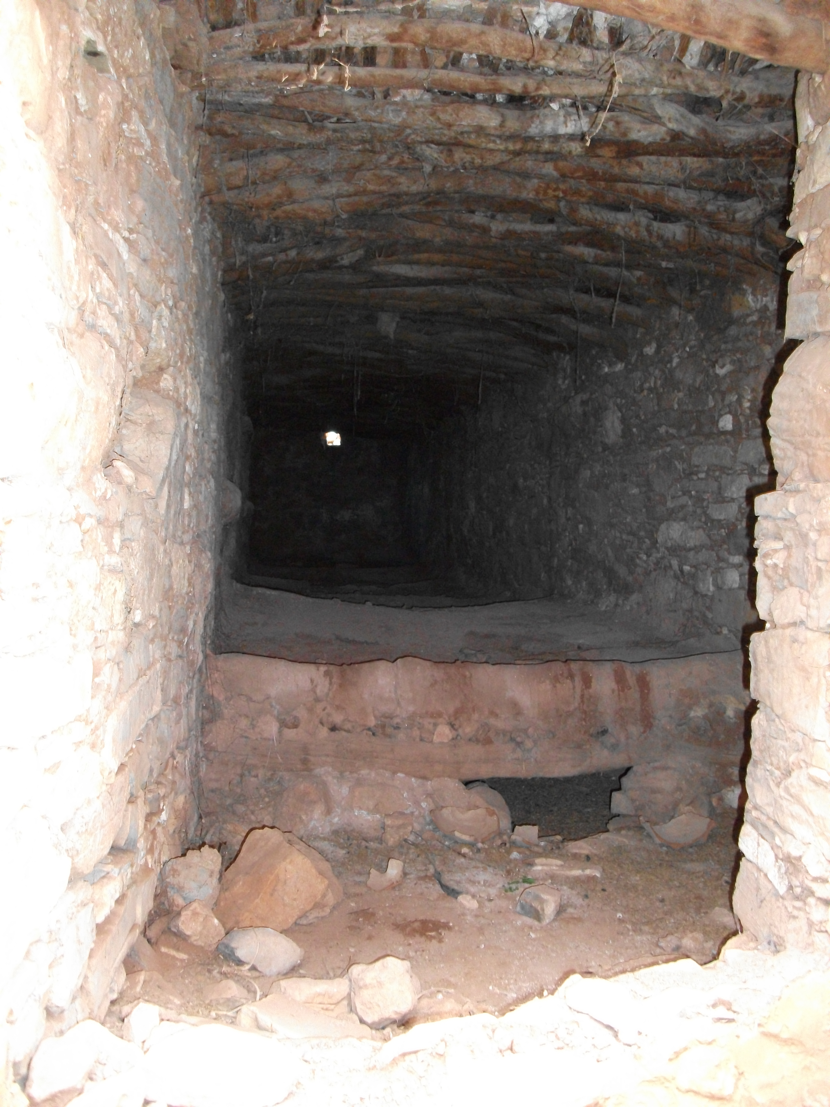 Agadir Imi'm Korn (Speicherkammer)